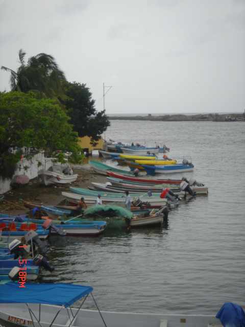 Photo prise le 01/05/2005 à Boca del Rio (Veracruz, Mexique) par Itomi Bhaa.